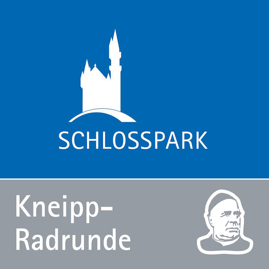 Logo Kneipp-Radrunde